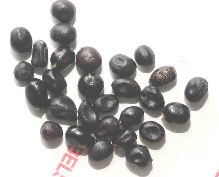 Paeonia anomala seeds